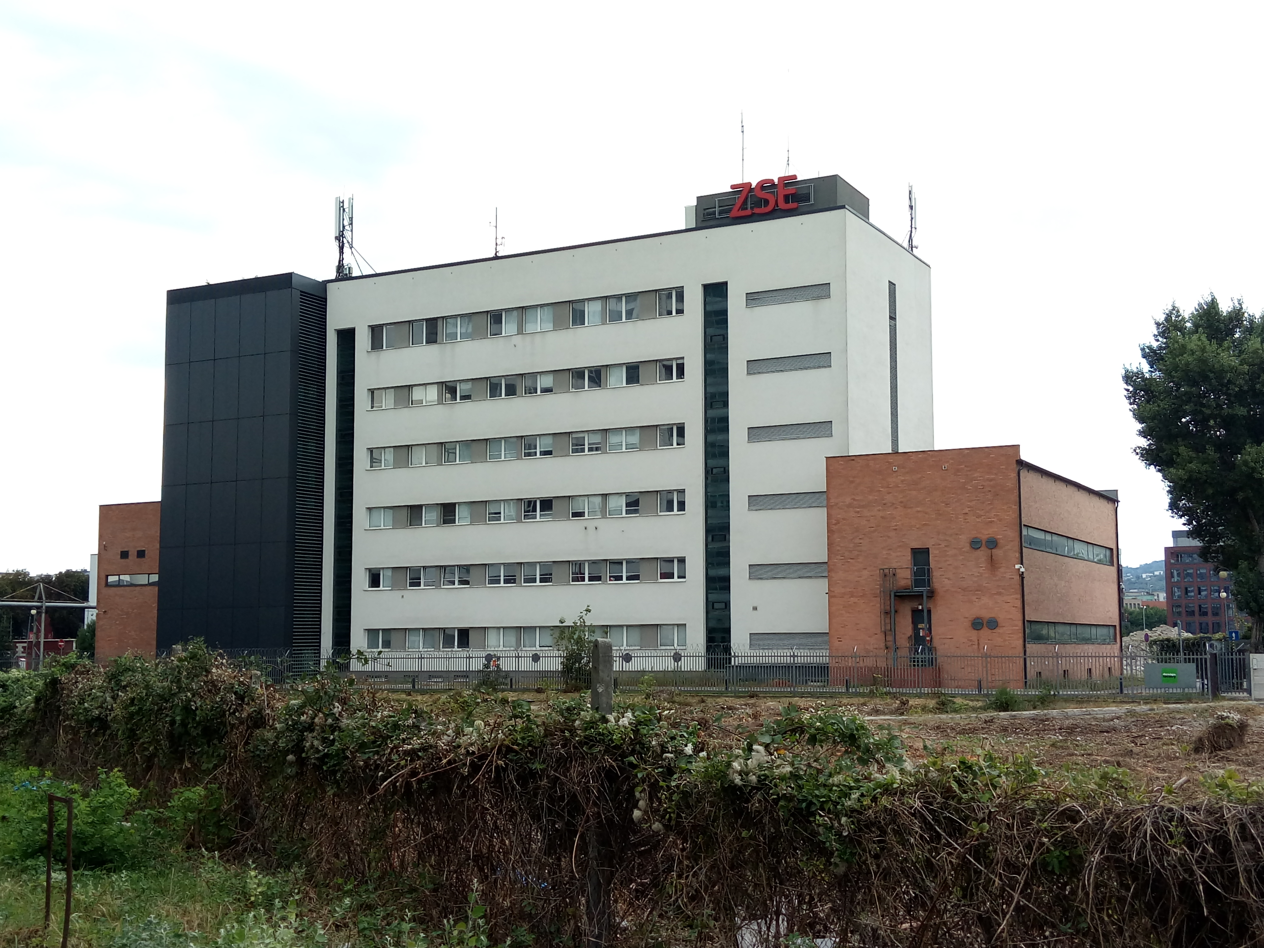 Čulenova 6, Ružinov, Bratislava